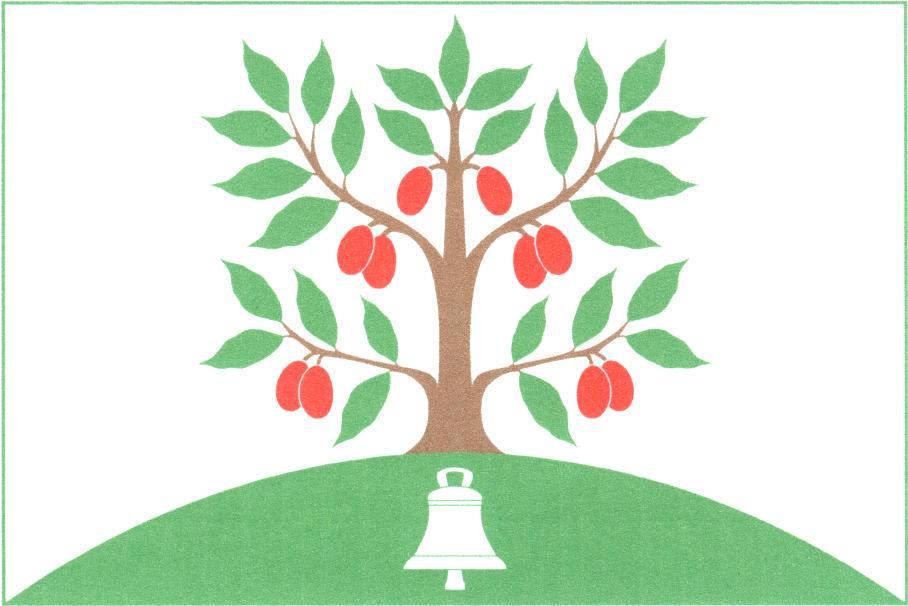 Vlajka obce Dřínov (okres Mělník)